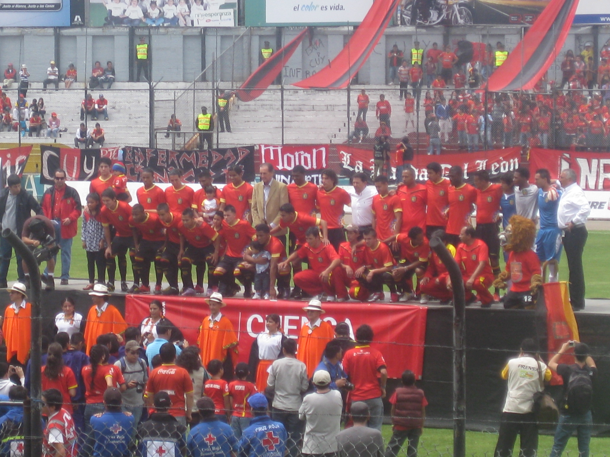 Plantilla Dep. Cuenca 2011